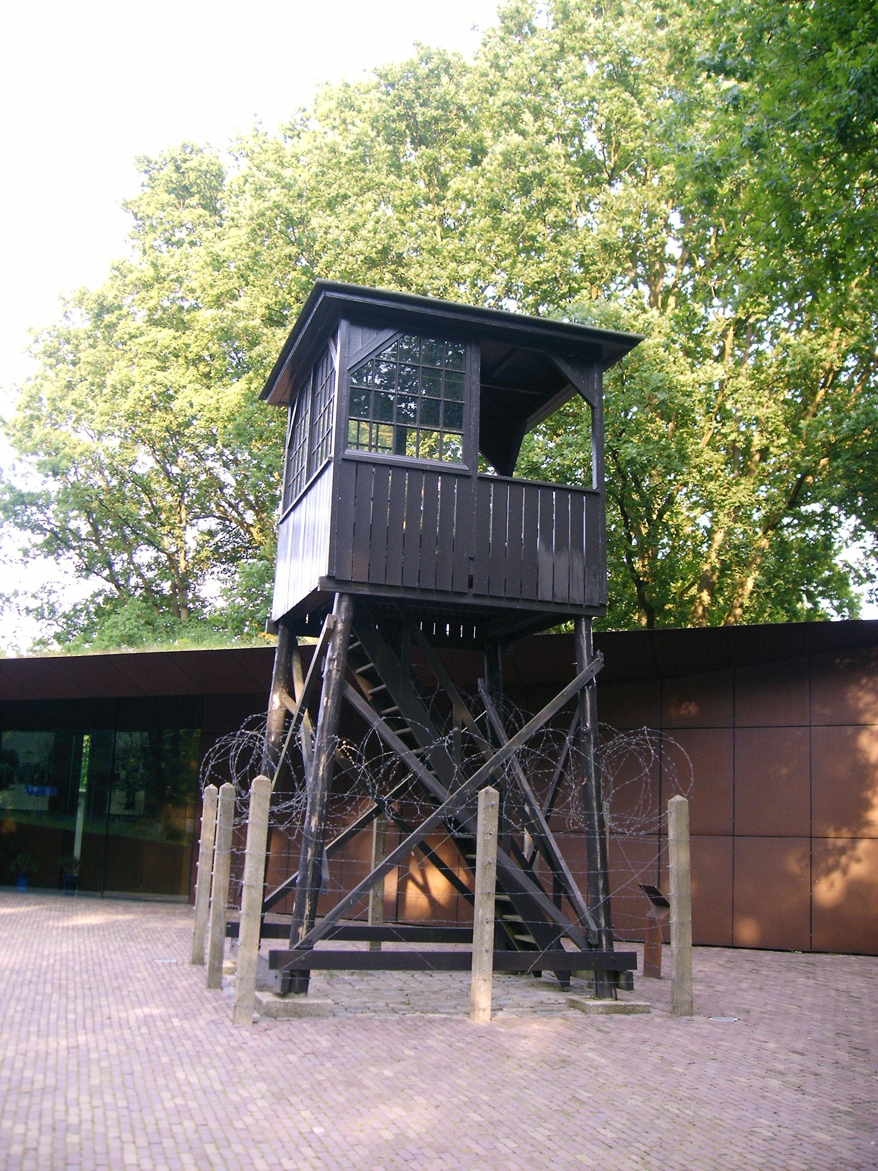 Kamp Amersfoort, origineel wachthuisje